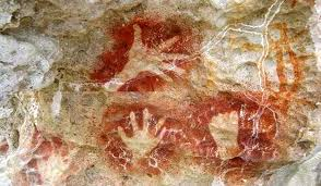 Situs Purbakala Tapurarang Kokas di Distrik Kokas Kabupaten Fakfak, Provinsi Papua Barat Indonesia